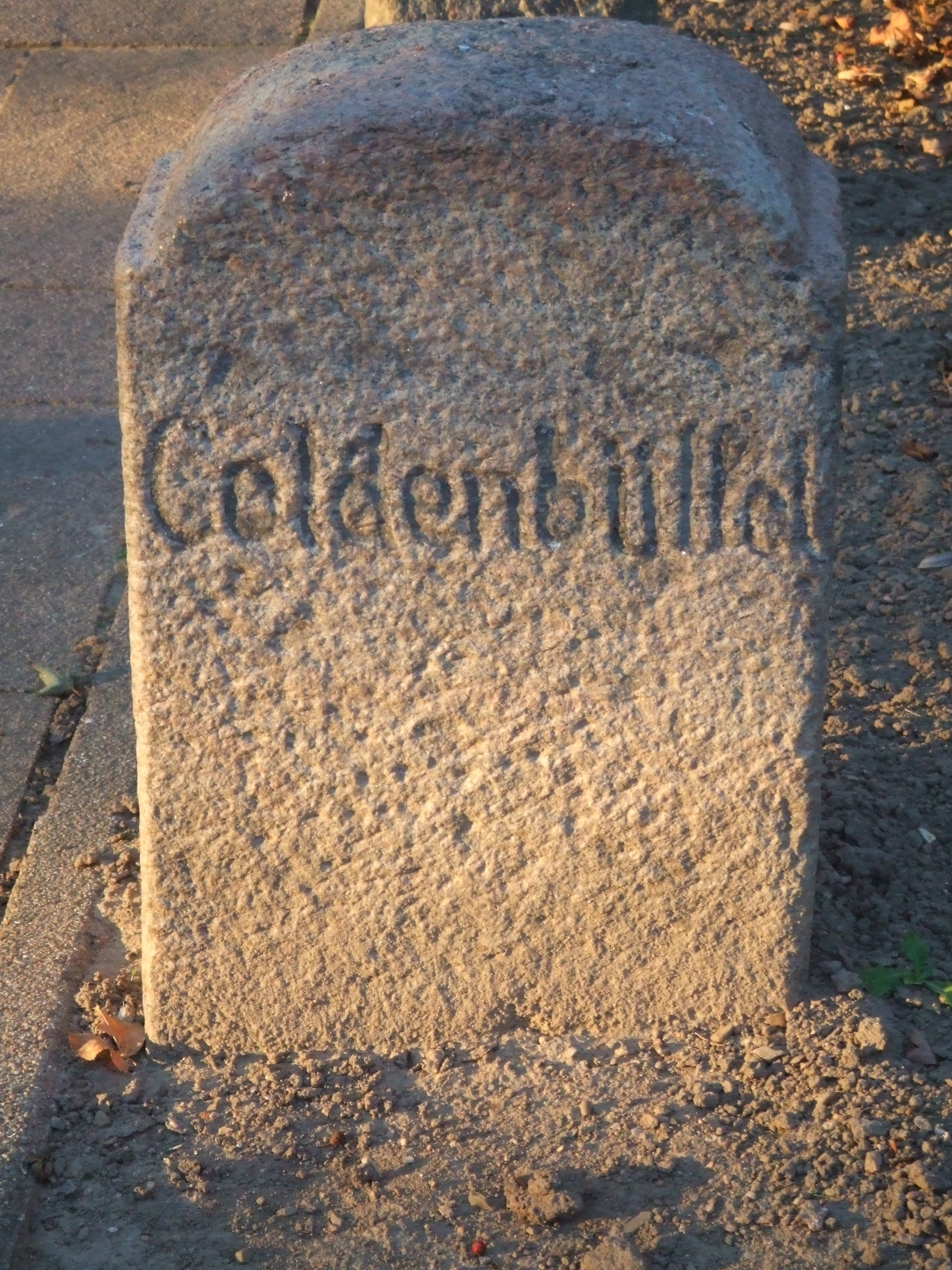 grenzstein aus koldenbüttel, germany